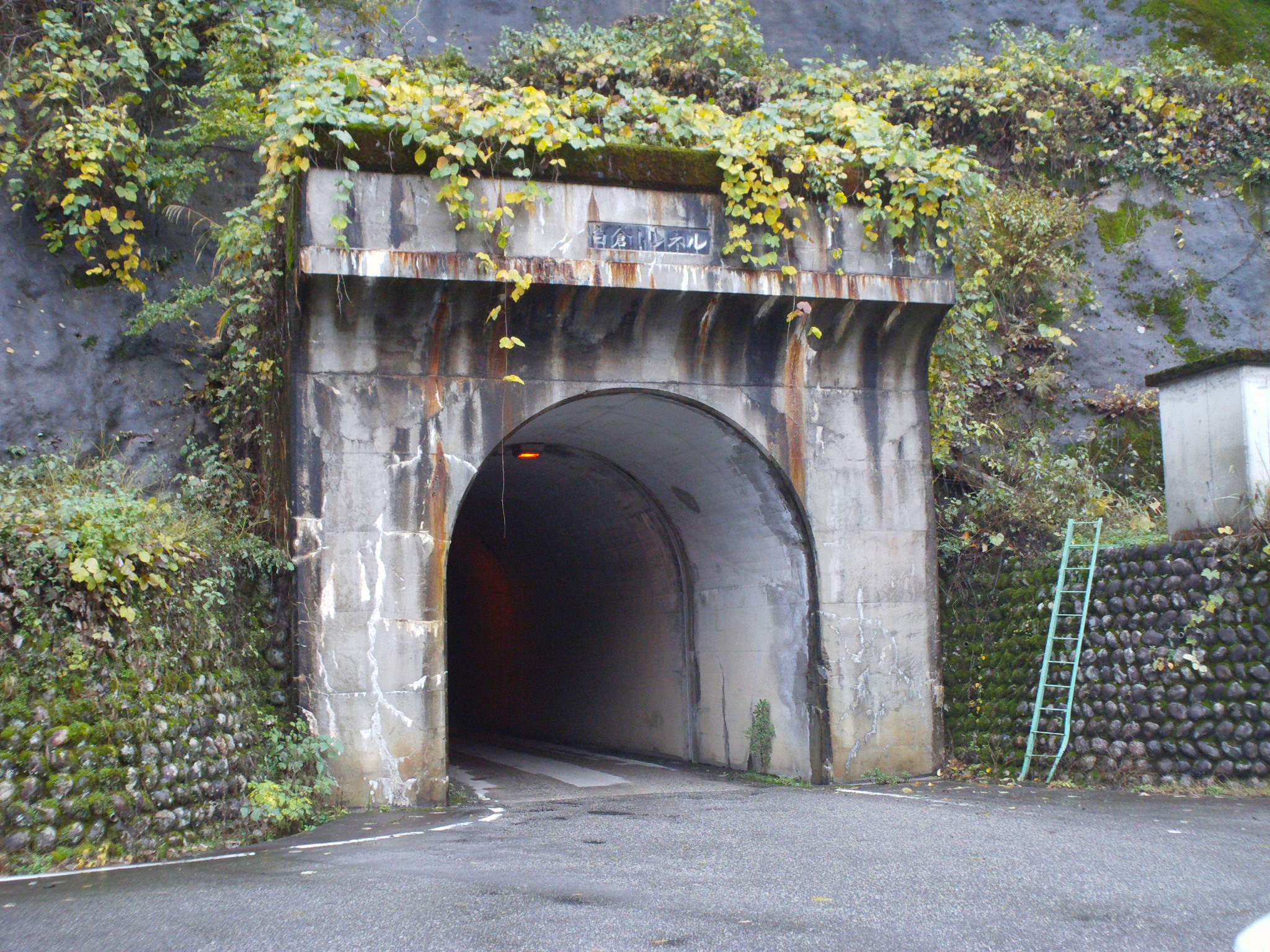 富山県魚津市、白倉トンネル